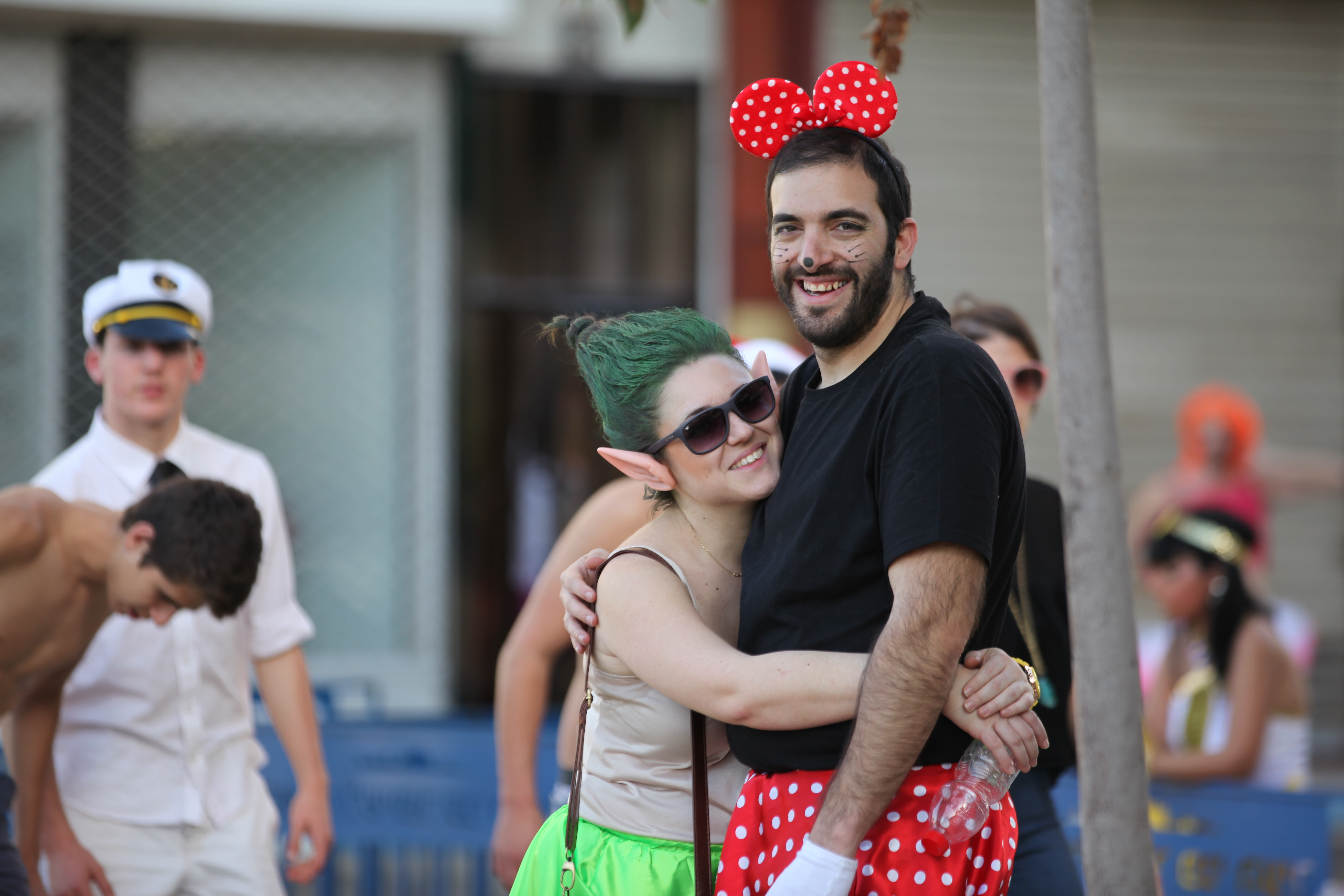 6.3.2015 2015 Purim in Israel